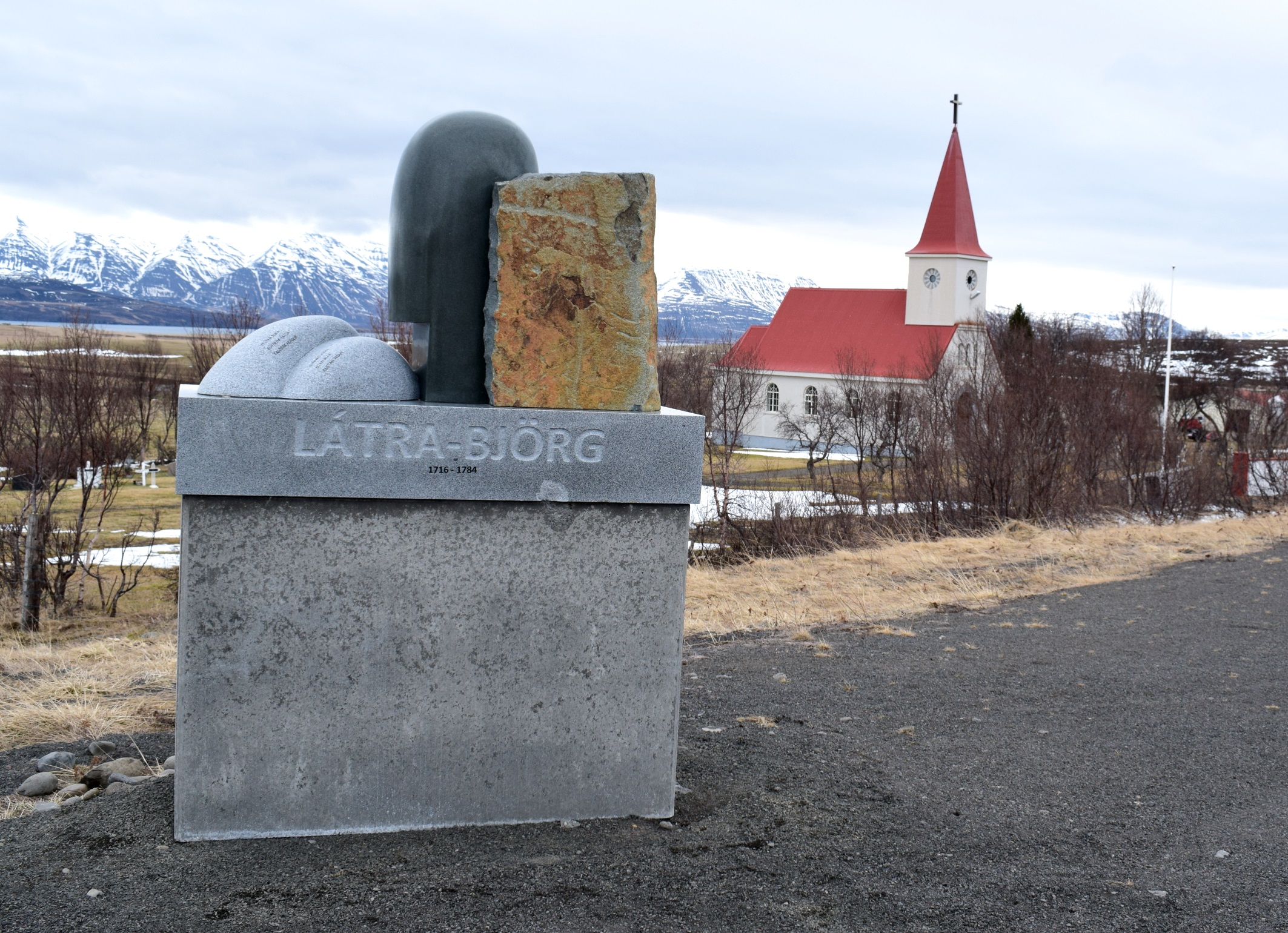 Minnisvarðu um Látra-Björgu að Stærra-Árskógi á Árskógsströnd eftir Sigurð Guðmundsson